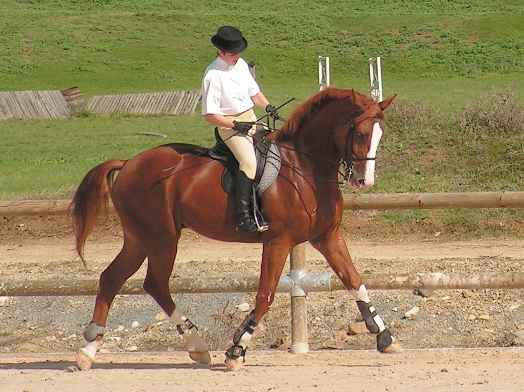 Air de dressage : épaule en dedans Date et lieu : 24/09/2006 à Niort en France Auteur : Karlyne